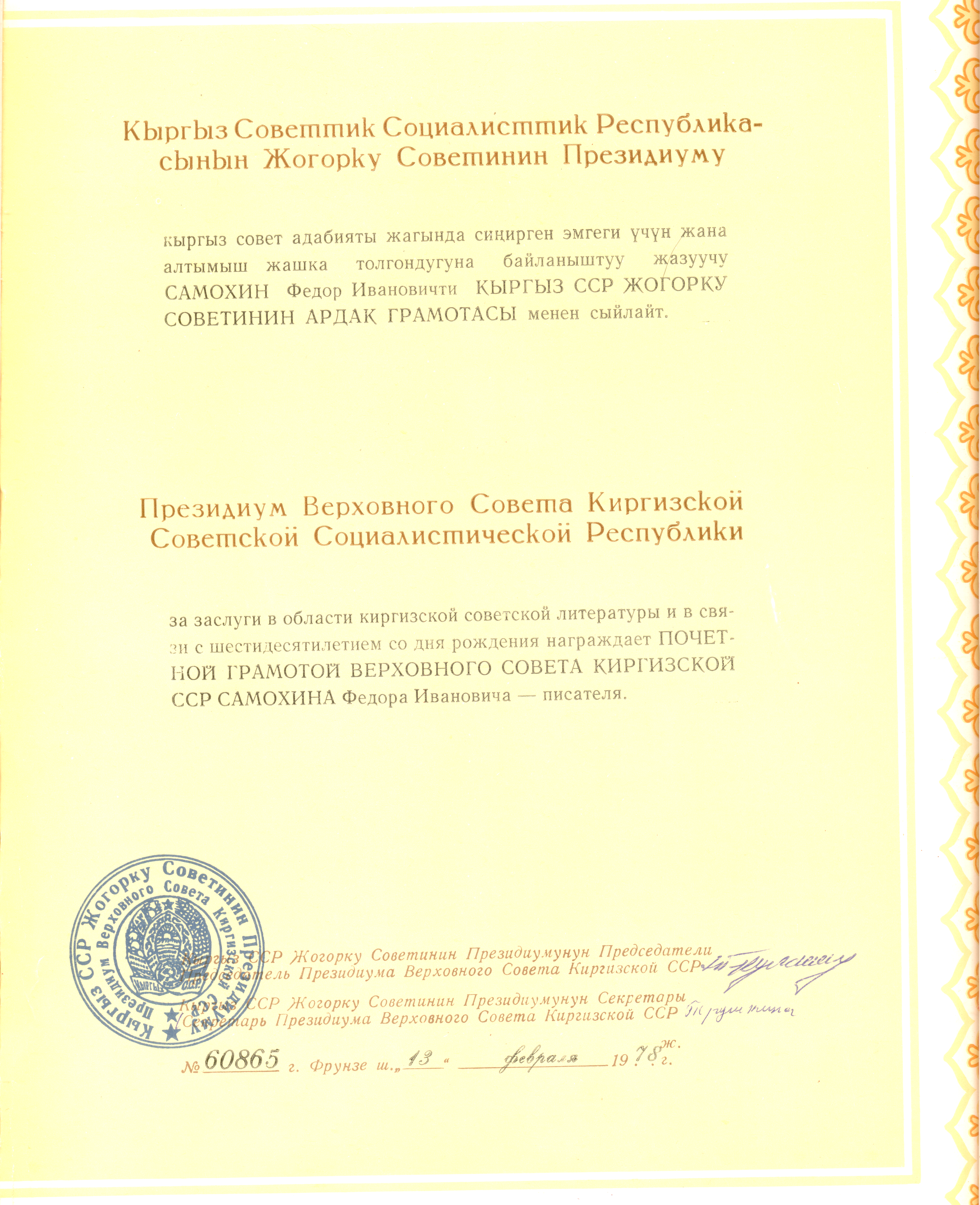 Почетная грамота Президиума Верховного Совета Киргизской ССР Самохина Фёдора Ивановича - писателя.